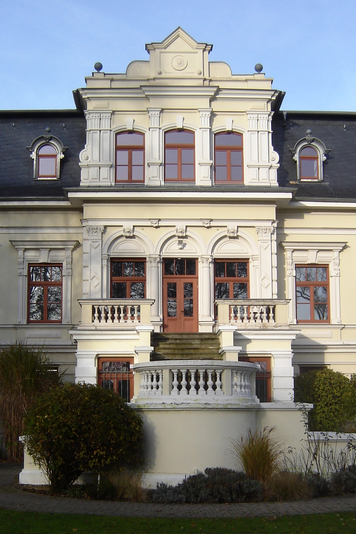 Magdeburg, Villa Böckelmann, südlicher Mittelrisalit